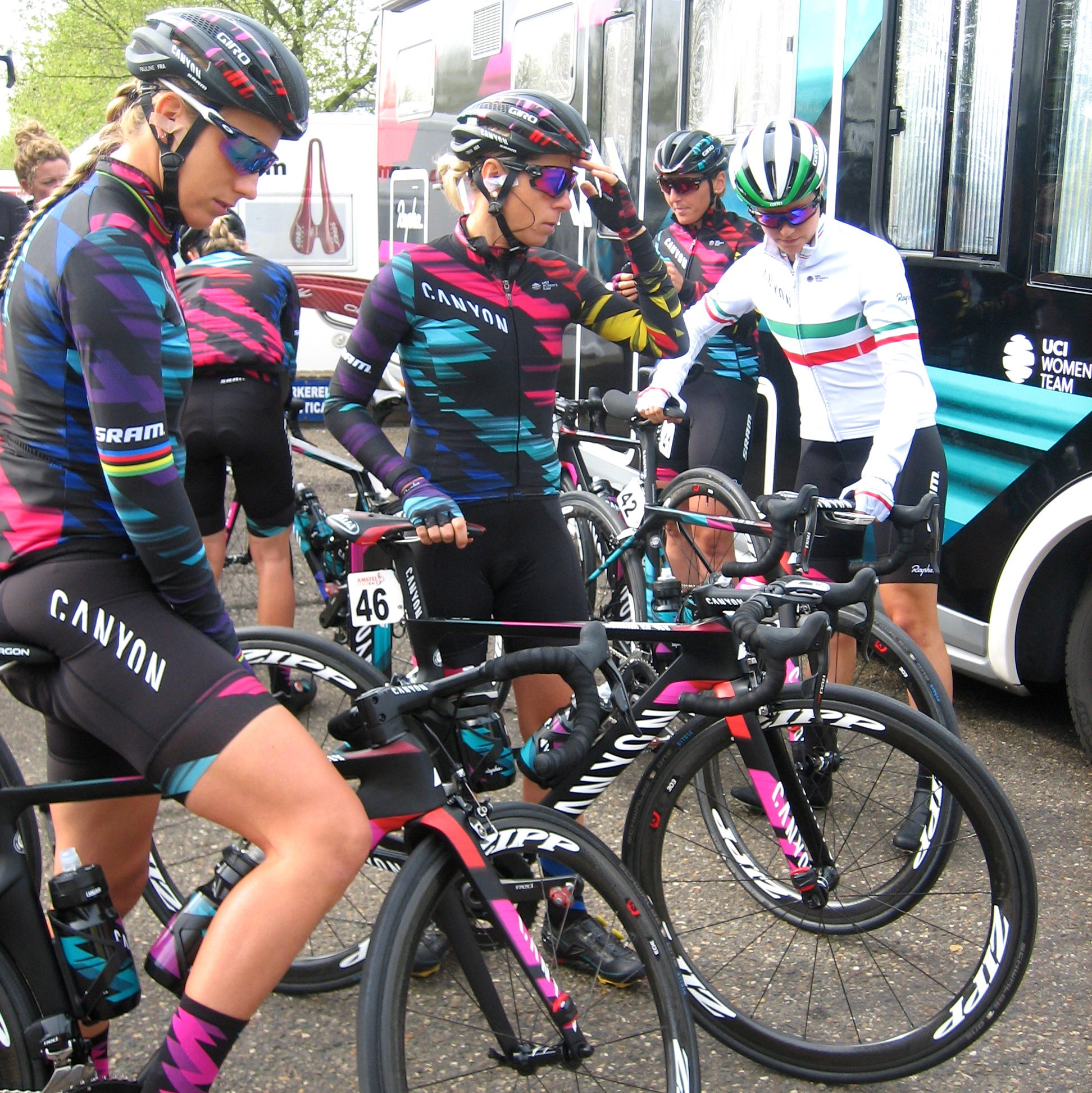 Start van de Amstel Gold Race Ladies Edition 2017 in Maastricht.